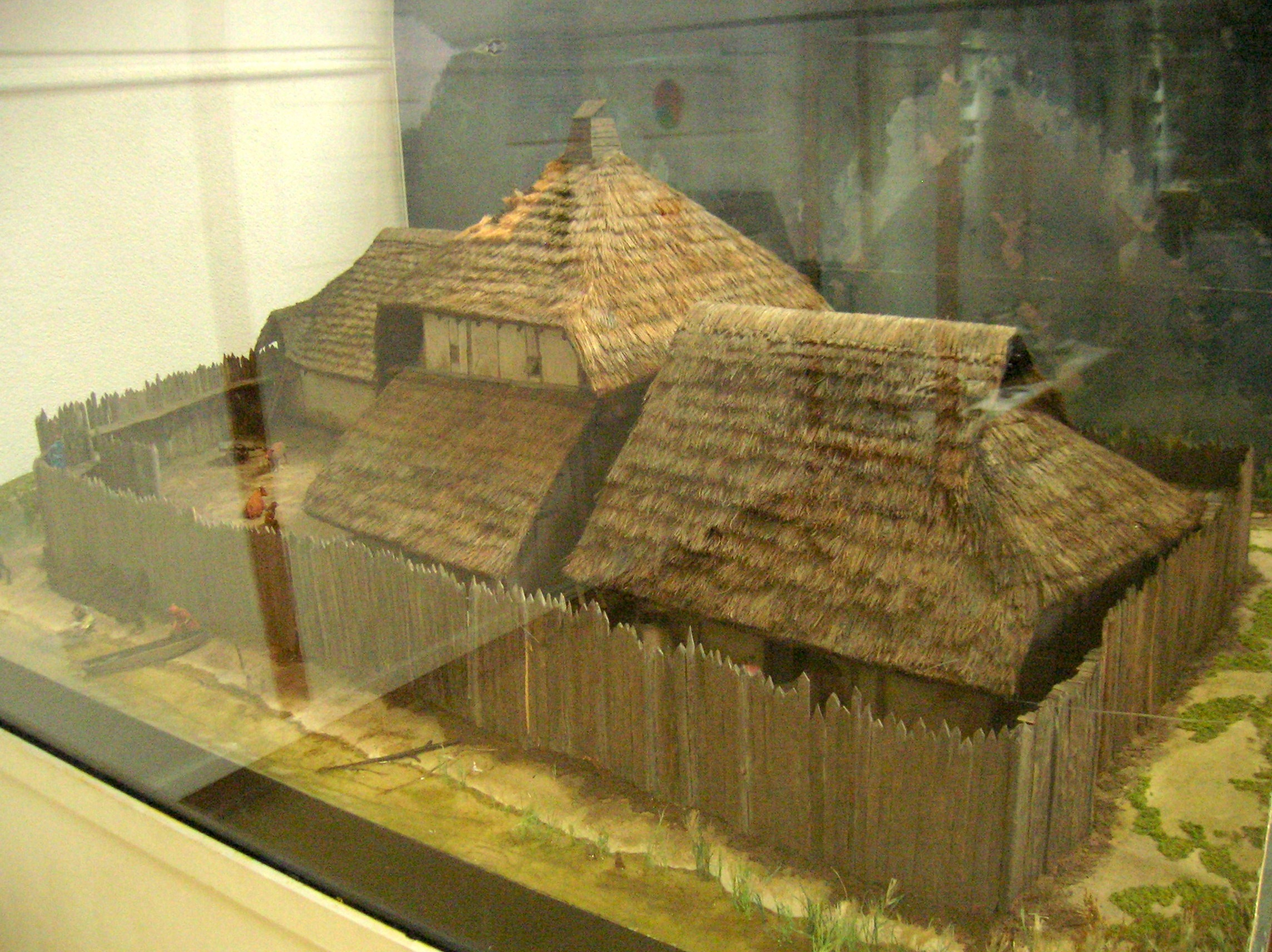 Reconstitution de l'habitat de Colletière. Musée archéologique du lac de Paladru. Charavines, Isère, AuRA, France.